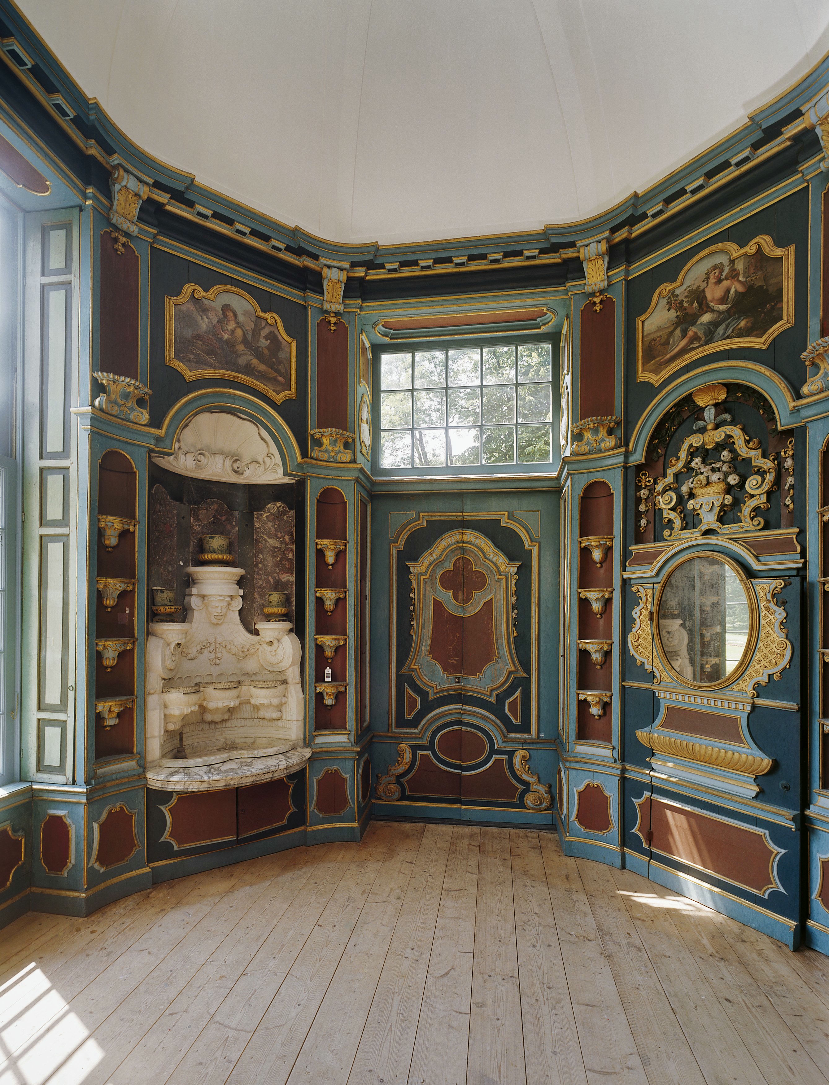 Kasteel Rosendael: Interieur theekoepel, gezien naar het zuiden, na restauratie